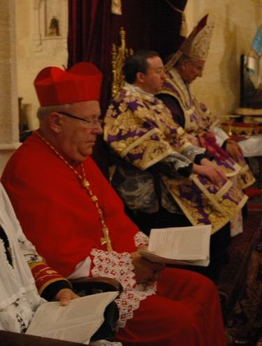 Le 22 septembre 2007, le cardinal Ricard assiste aux ordinations célébrées dans le rite tridentin par le cardinal Darío Castrillón Hoyosà à l'Institut du Bon-Pasteur en l'église Saint-Eloi à Bordeaux.